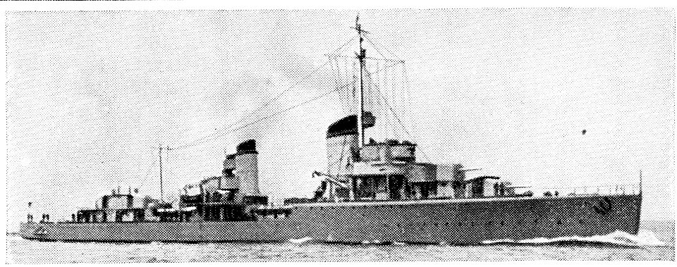 German destroyer Leberecht Maass (1937)